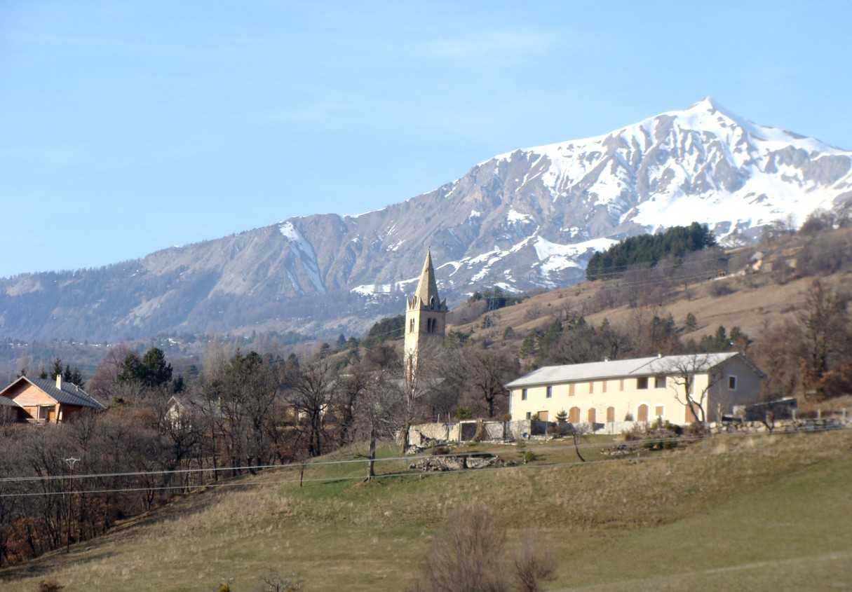 Prunières (Hautes-Alpes) : le quartier de l'église. A l'arrière-plan, le Piolit [à vérifier].